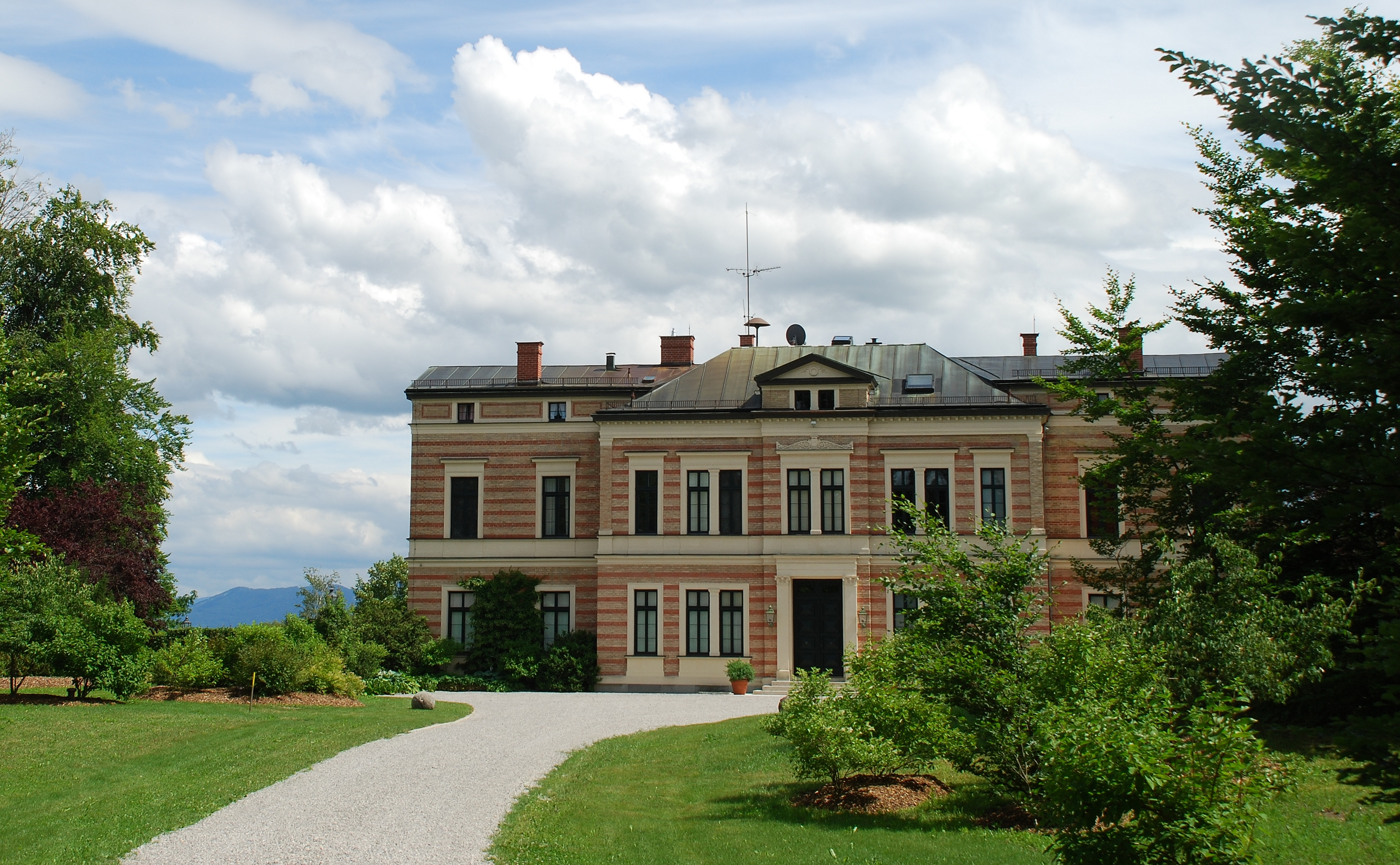 Seeshaupt, OT Seeseiten 11. Schloss Seeseiten (auch Landhaus von der Pfordten genannt) gehört zu den größten und bedeutendsten Villen am Starnberger See. Den kubischen Bau mit angedeuteten Seitenflügeln und Ecktürmchen in streng symmetrischen und spätklassizistischen Formen ließ sich der bayerische Minister des Äußeren und Vorsitzender des Ministerrats Ludwig von der Pfordten 1866/67 von dem Münchner Architekten Georg von Dollmann errichten. Das Gebäude liegt am Ufer des Sees inmitten einer großen Parklandschaft, die der Hofgartendirektor Karl von Effner anlegte.[1]